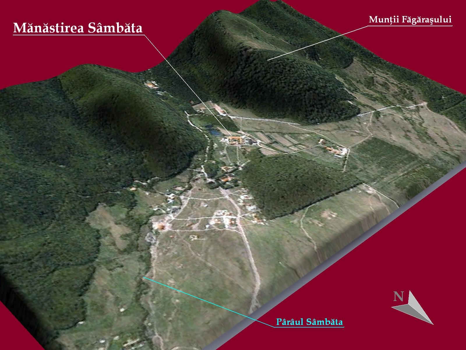 Prelucrare 3D pentru Mănăstirea Sâmbăta. Imagine realizată cu date SRTM furnizate liber de NASA si textură World Imagery - NASA World Wind.